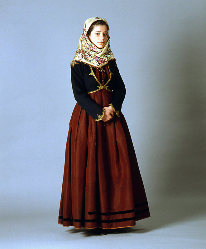 Φορεσιά από τις Σπέτσες. Συλλογή Πελοποννησιακού Λαογραφικού Ιδρύματος, Ναύπλιο